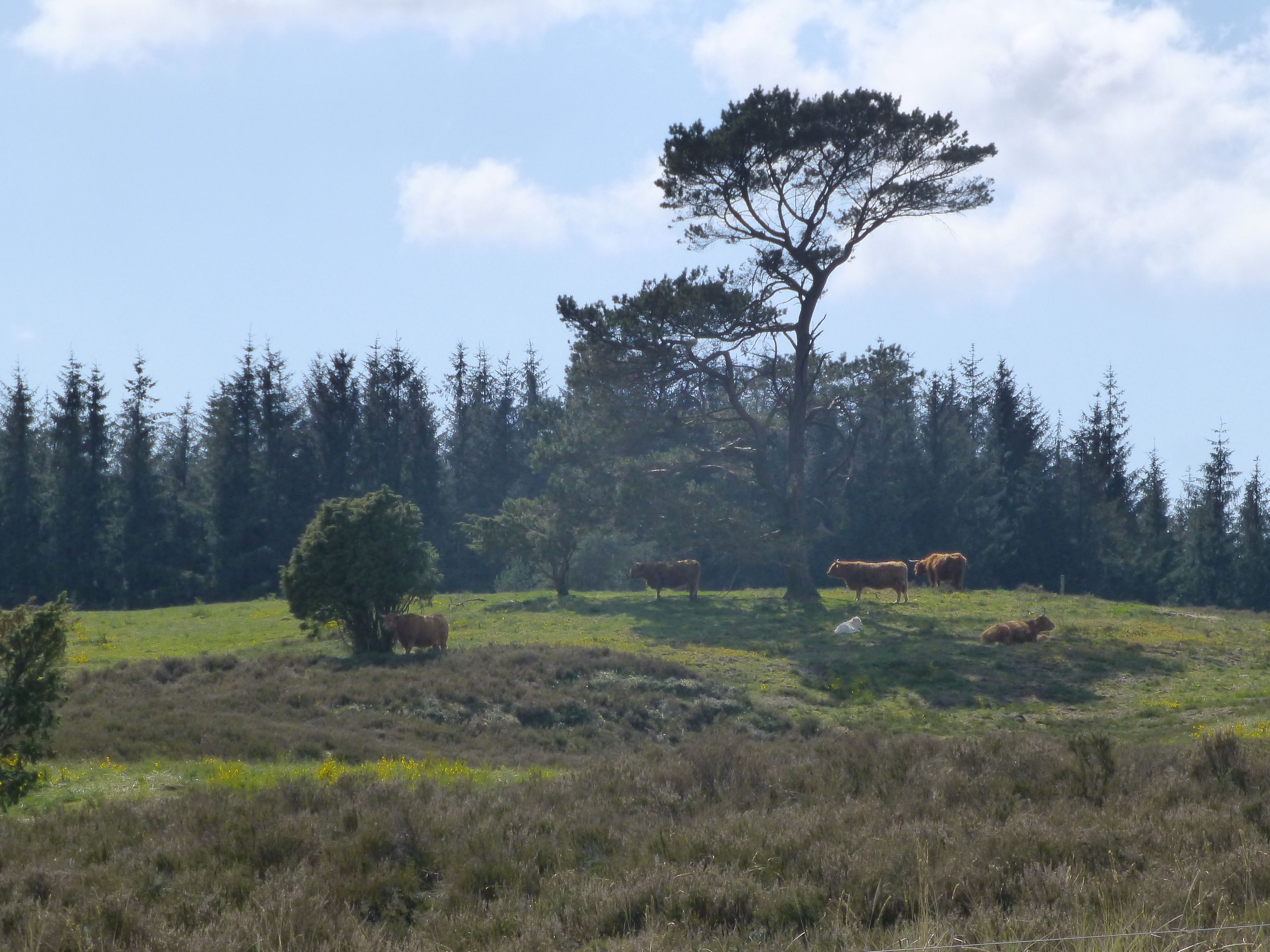 Vrads Sande set mod syd fra Hjøllundvej